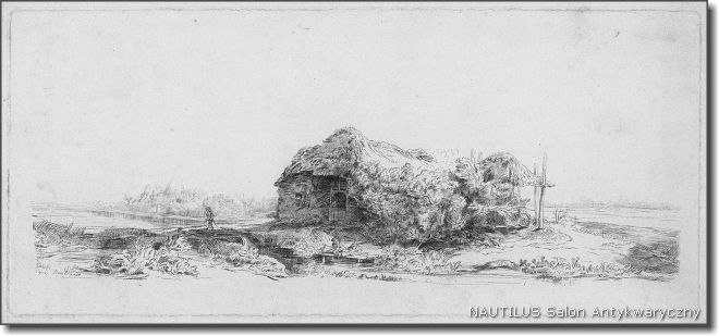 Pejzaż z domem według Rembrandta, po 1863 Akwaforta; wym.: 155 x 350 mm; sygn. oł. l.d.: Zaleski d'apres Rembrandt. Artysta wykonał cztery grafiki według dzieł Rembrandta. Lit.: E. Rastawiecki, "Słownik rytowników polskich", Poznań 1880, s. 303.